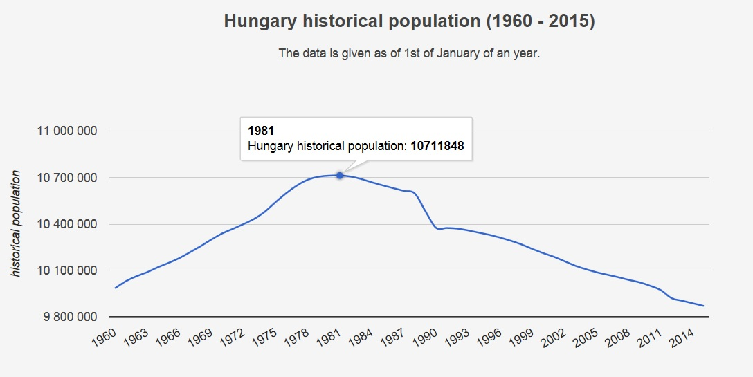 Magyarország népessége 1960-2015